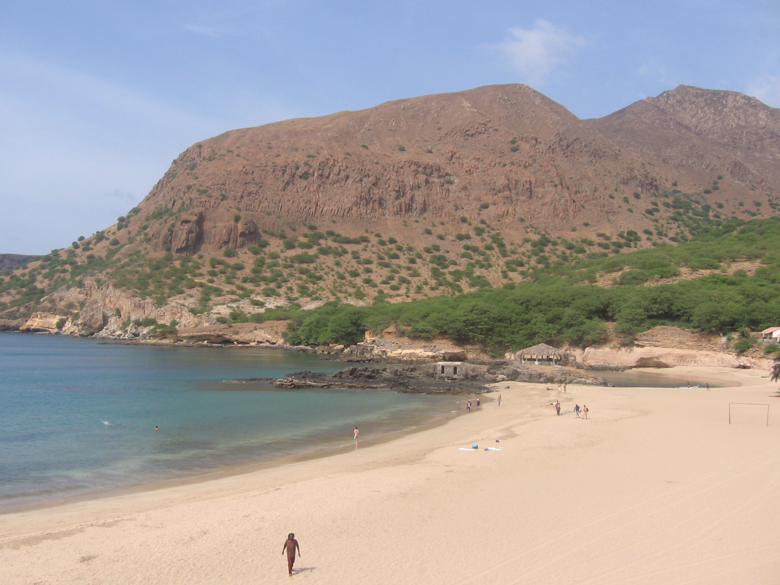 Praia do Tarrafal, Santiago, Cabo Verde